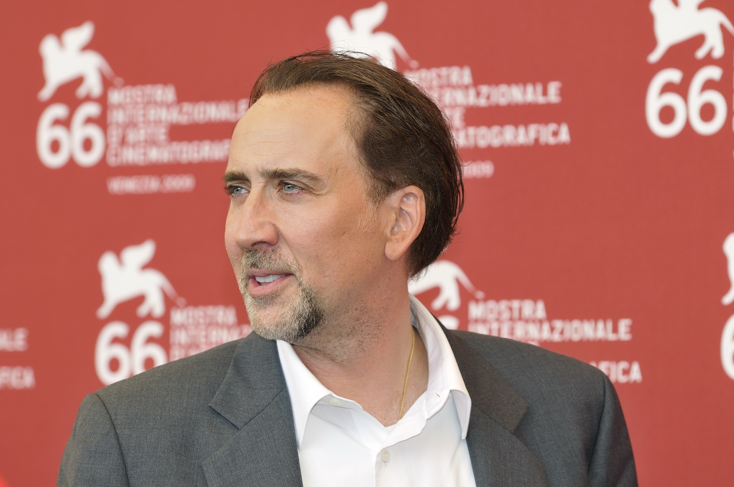 66ème Festival du Cinéma de Venise (Mostra), 3ème jour (04/09/2009) Photocall avec Nicolas Cage, Eva Mendes et le réalisateur Werner Herzog pour le film : Bad Lieutenant : Port of Call New Orleans